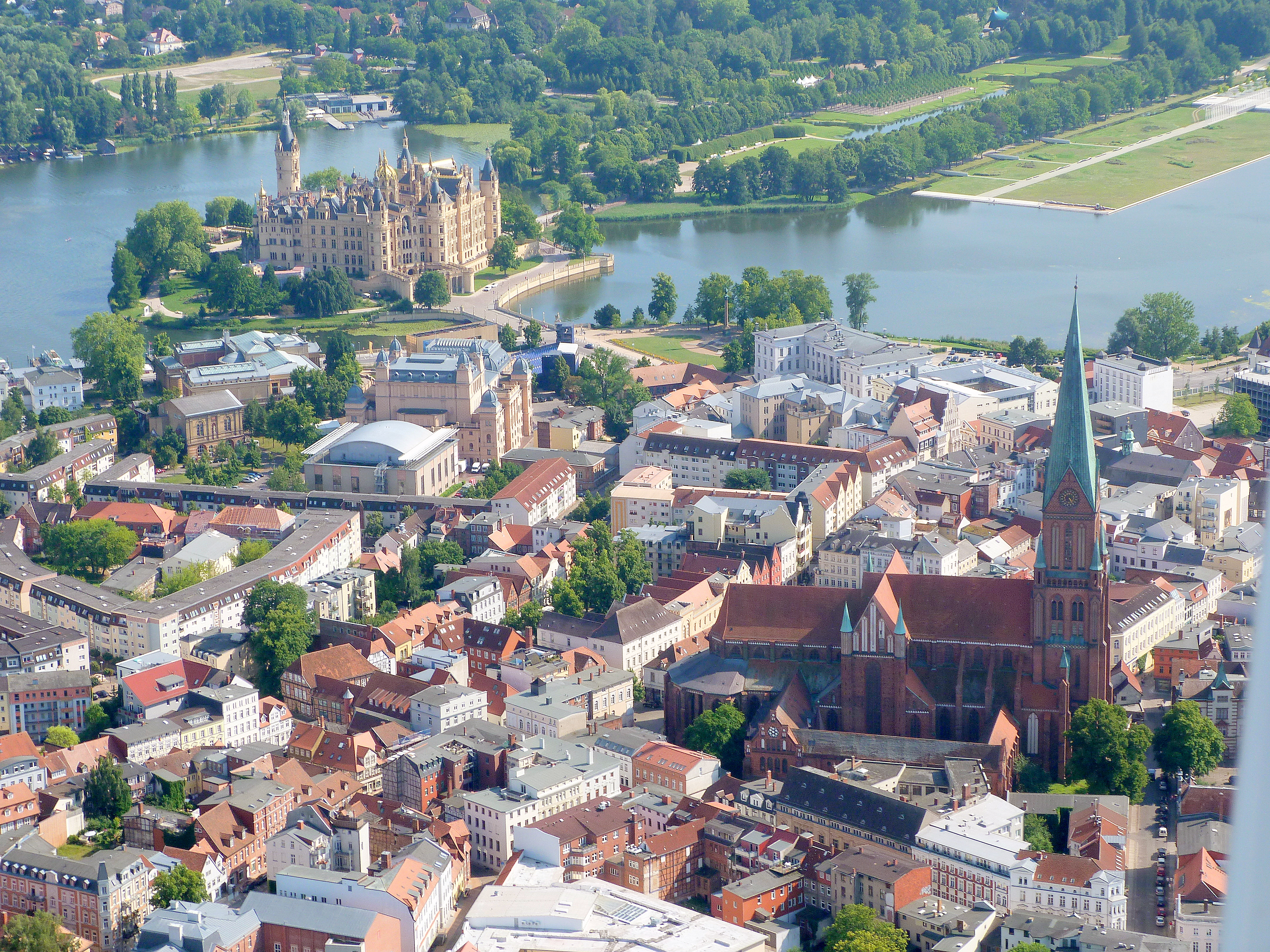 Schwerin aus dem Flugzeug gesehen